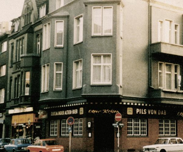 Ehemalige Backstube an der Moltkestraße, Ecke Kaiserstraße in der östlichen Dortmunder Innenstadt, in der das Unternehmen Murtfeldt Kunststoffe 1954 gegründet wurde.